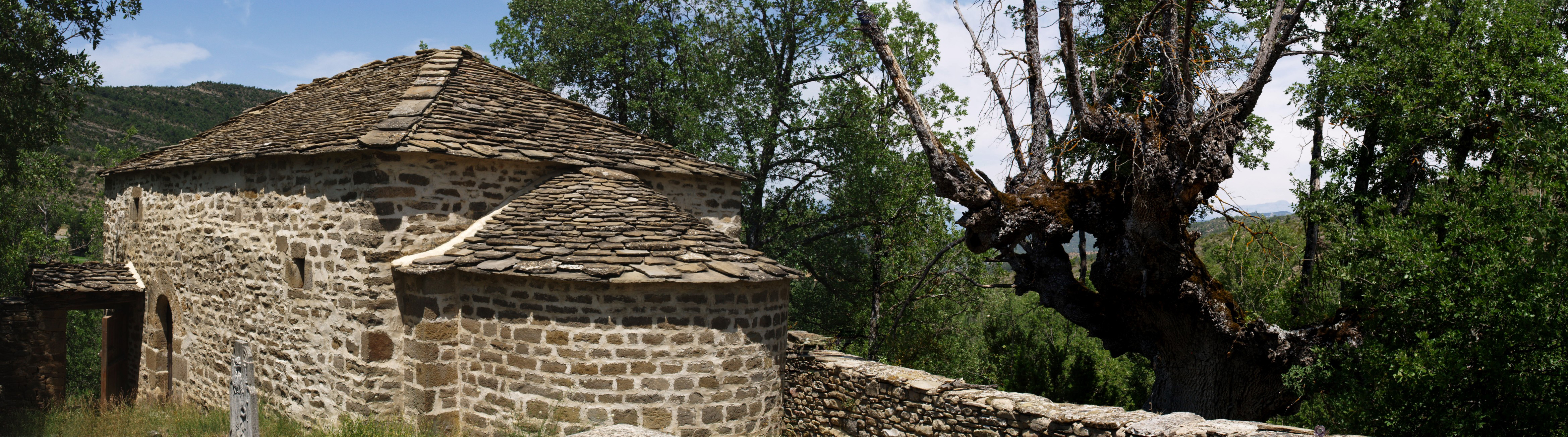 Aragonés: Ixta eremita estió feita en onor a San Ramón en o sieglo IX. Ye en a zona pre-pirenaica clamada de A´Guarguera, en o chicote nuclio de Belarra.